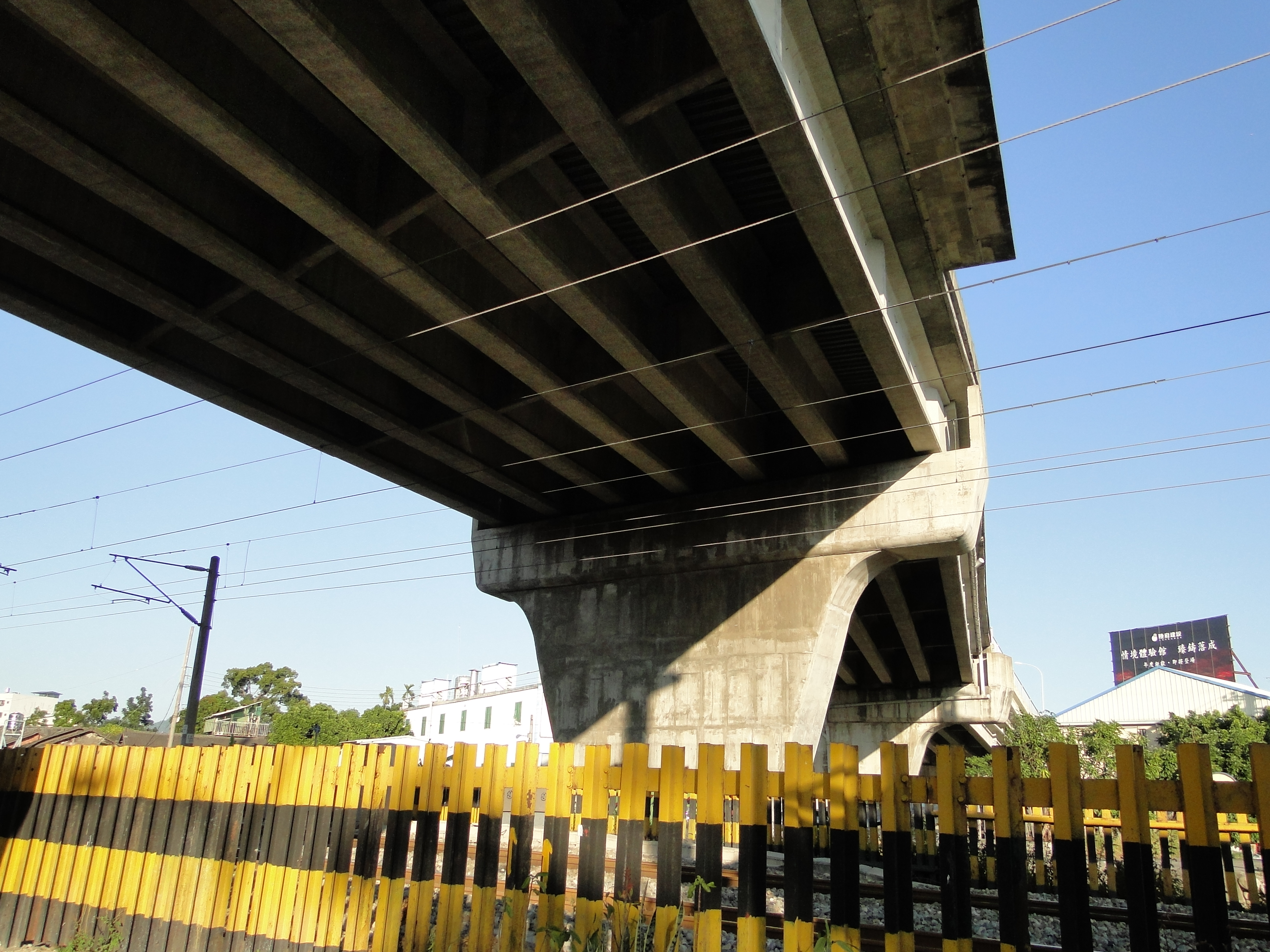 中文（台灣）: 台灣台中市北屯路、松竹路口上方高架橋即松竹陸橋。（2010/1/10）